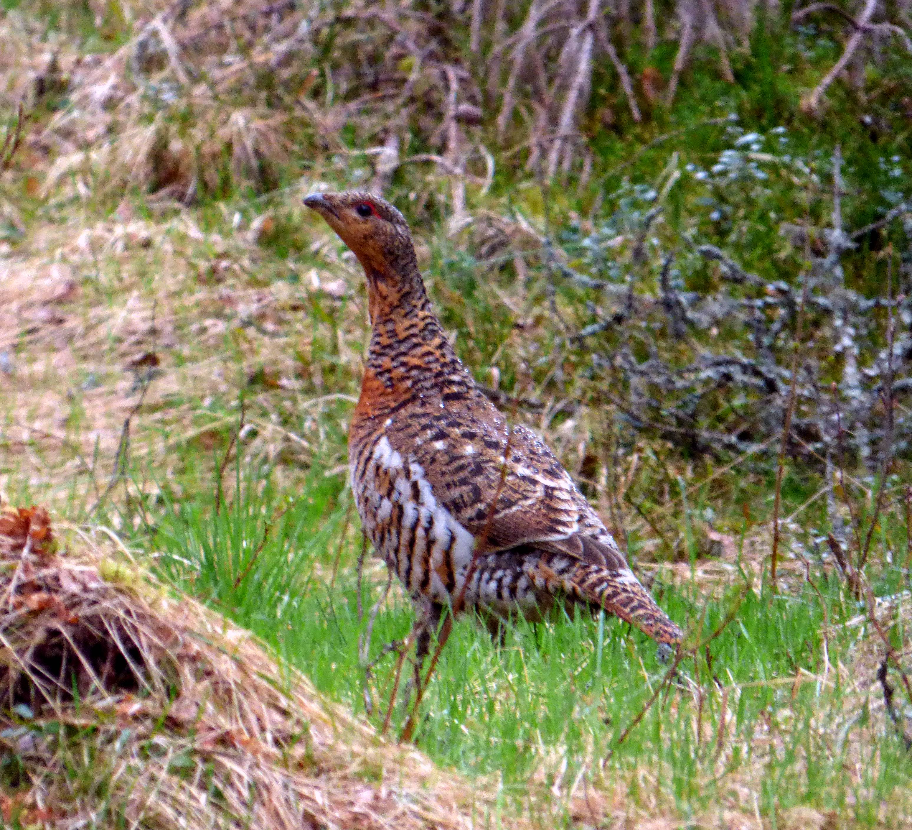 Auerhuhn in Jönköpings län (Schweden)